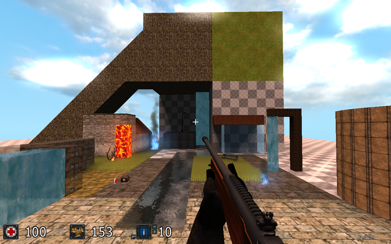 Dieses Bild ist ein Screenshot aus dem Ego Shooter Cube2; Es stellt eine Szene aus dem Karteneditor dar.